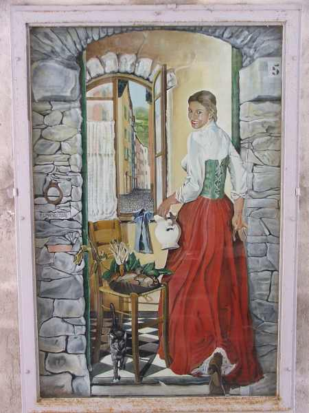 Ligure: O ritræto da Rêuza Garavénta, poscìbile "Bèlla de Torìggia", fæto da-o Lumàchi. O s'atróva sótta l'Èrco inta Ciàssa Fiéschi.